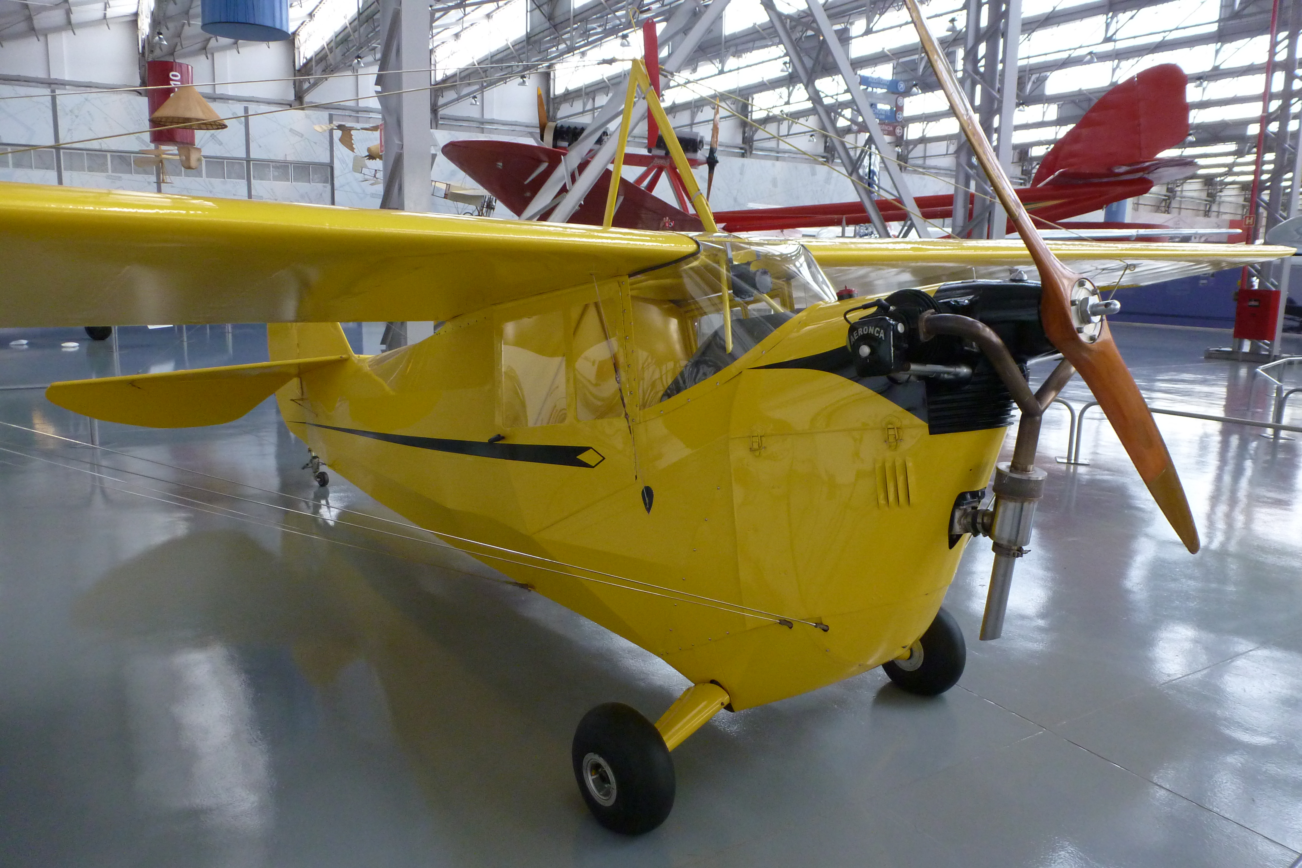 Visita ao Museu da TAM, em São Carlos, no Brasil.